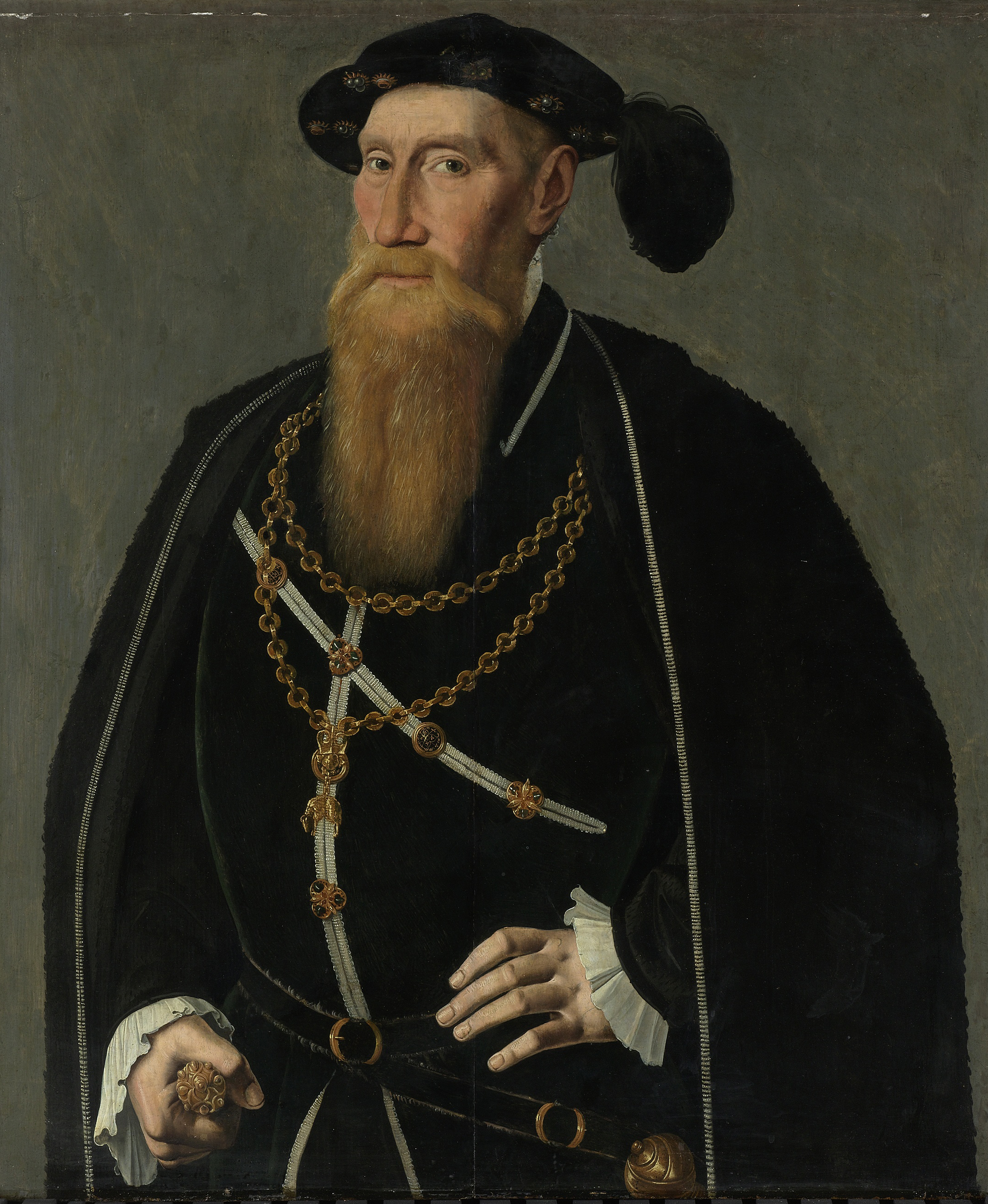 Portrait of Reinoud III van Brederode (1493-1556), Lord of Vianen.